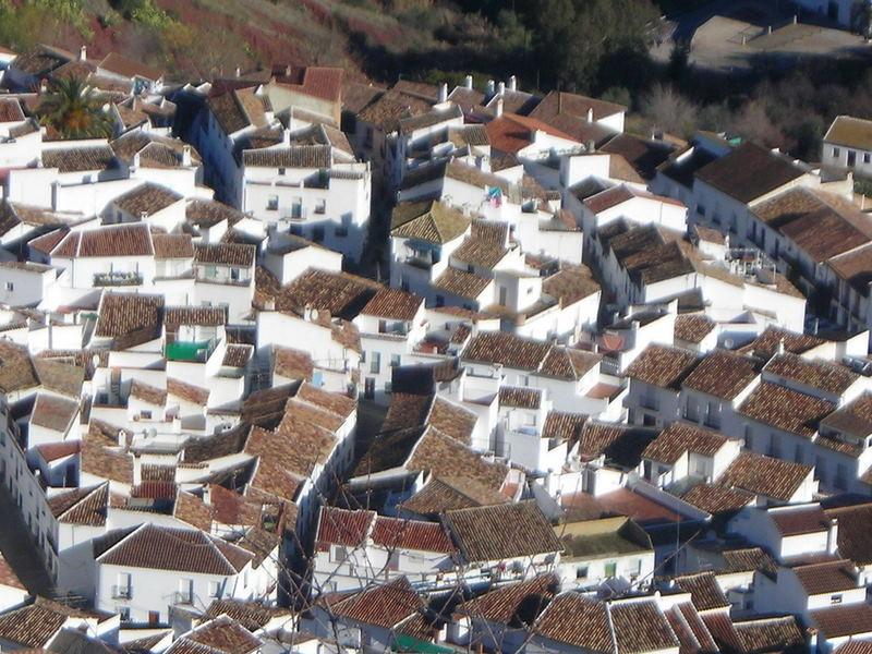 el gastor ene 12